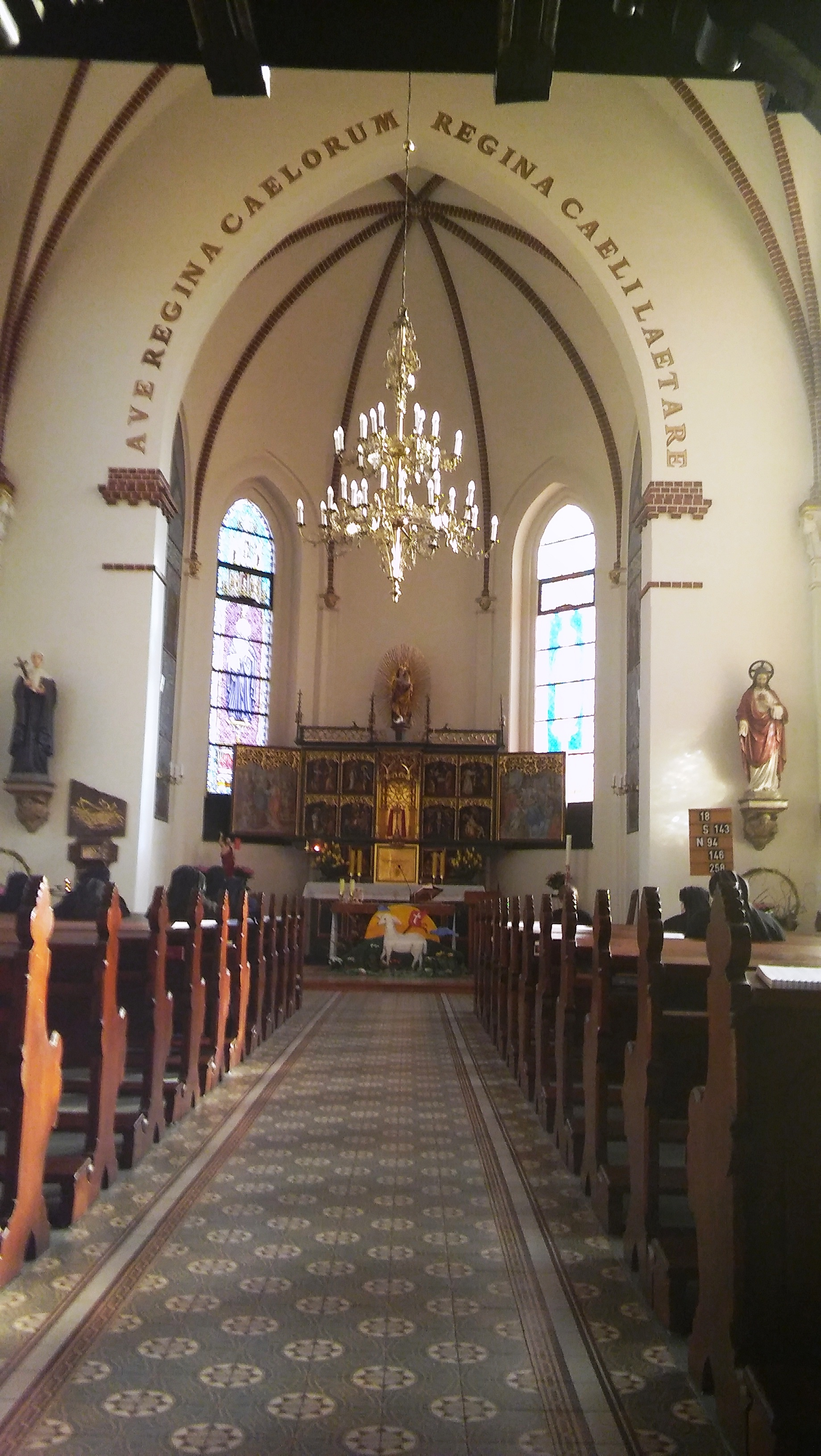 Kaplica „Regina Coeli” w Braniewie katarzynki